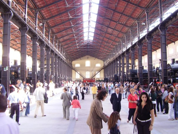 Museo di Pietrarsa, padiglione delle locomotive a vapore